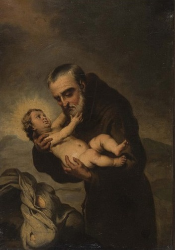 San Félix de Cantalicio, óleo sobre lienzo, 51 x 22 cm, colección privada